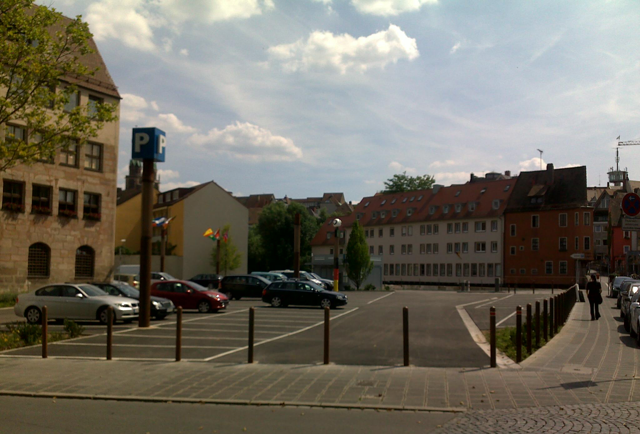 Parkplatz auf dem Gelände des Augustinerhofes